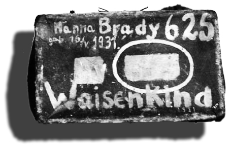 Valise d'Hanna Brady (Hana Bradyovà 1931-1944)